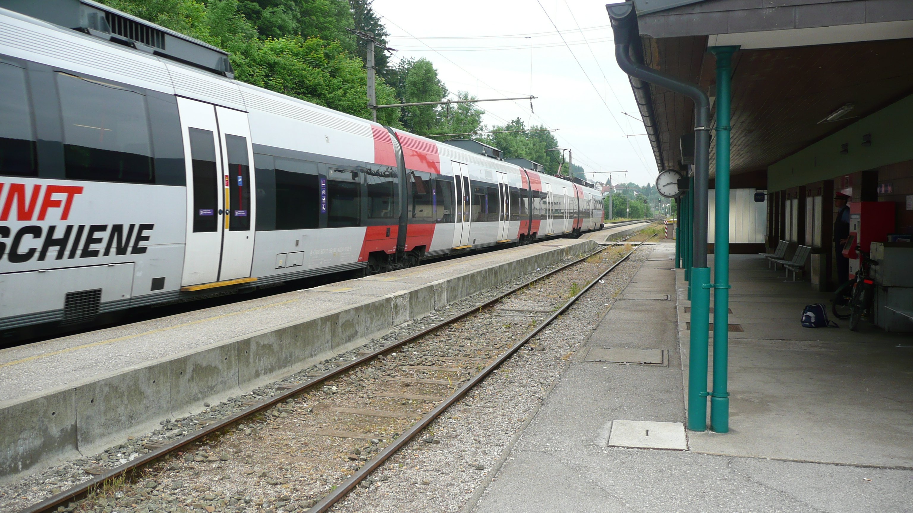 R 3931 bei der Ausfahrt aus dem Bahnhof Kremsmünster (Fahrplan 2008)